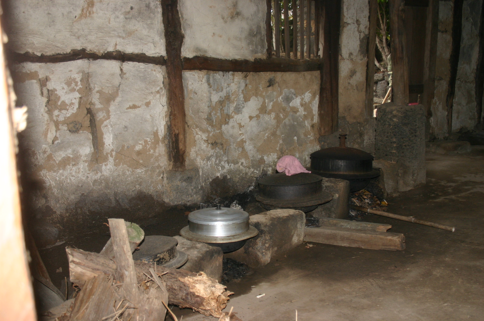 Korea-Jeju-Folk village